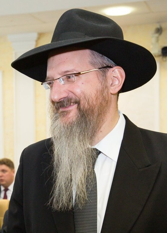 Берл Лазар (род.1964) — главный раввин Российской Федерации по версии любавических хасидов